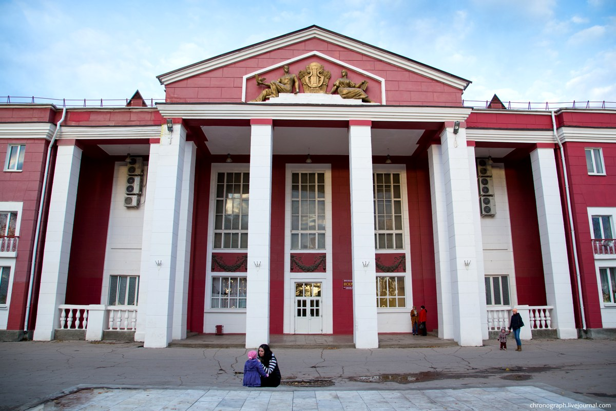 Дом культуры "Искра" 1952 года постройки. Посёлок Красная Глинка, Самара, Россия